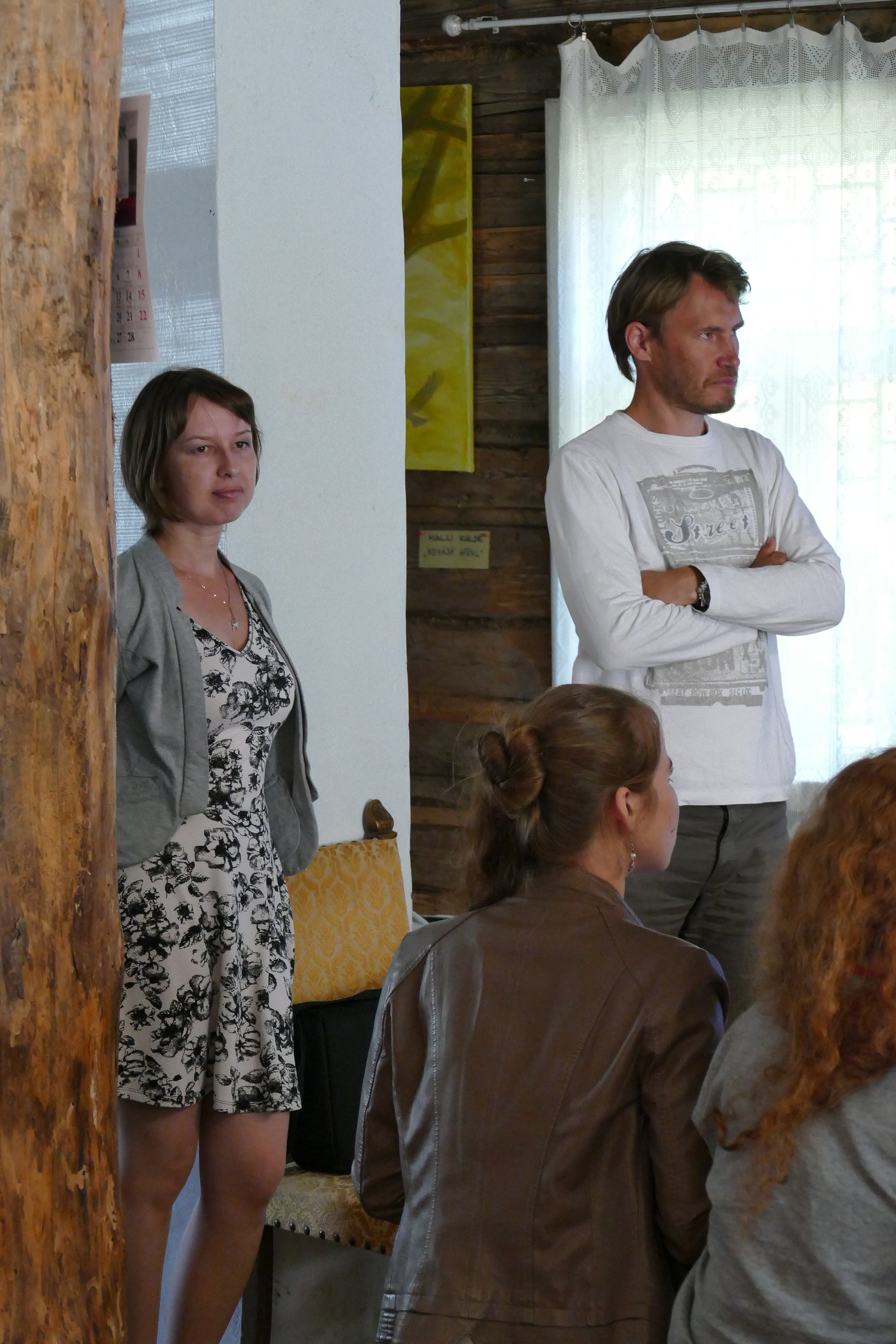 Soome-ugri vikiseminari avamine Obinitsas.